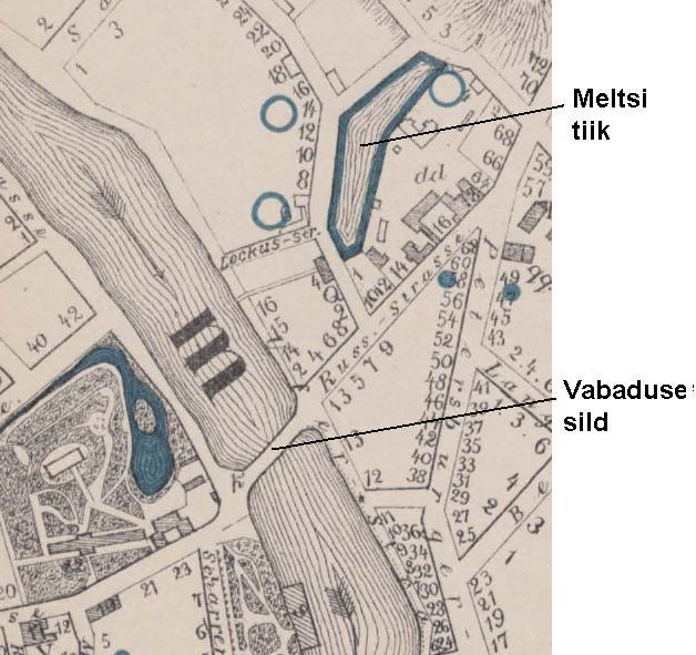 Meltsi tiik 19. sajandil